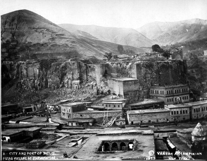 1923 yılı bitlis